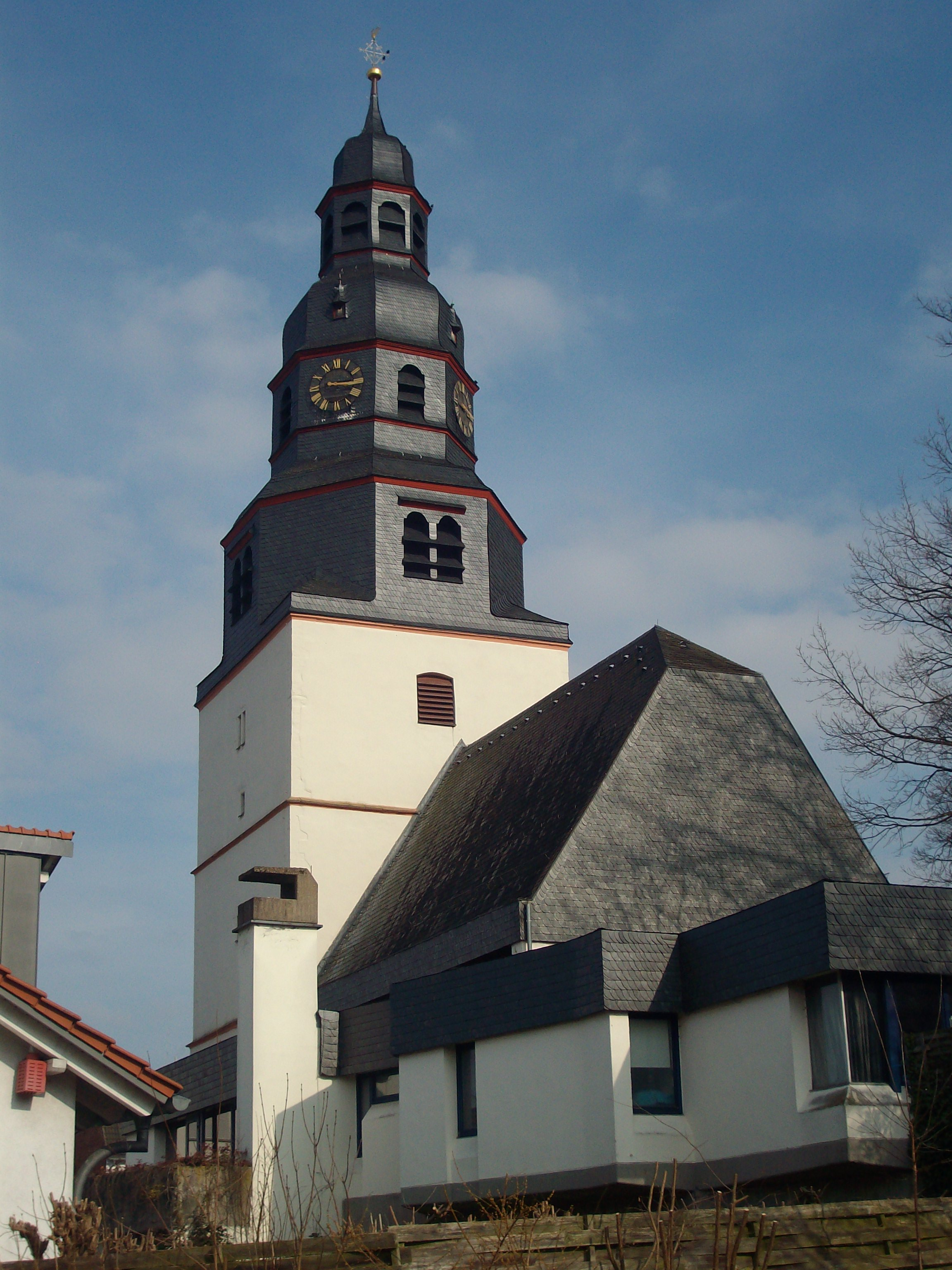 Jakobikirche, Lang-Göns, Hessen, Deutschland